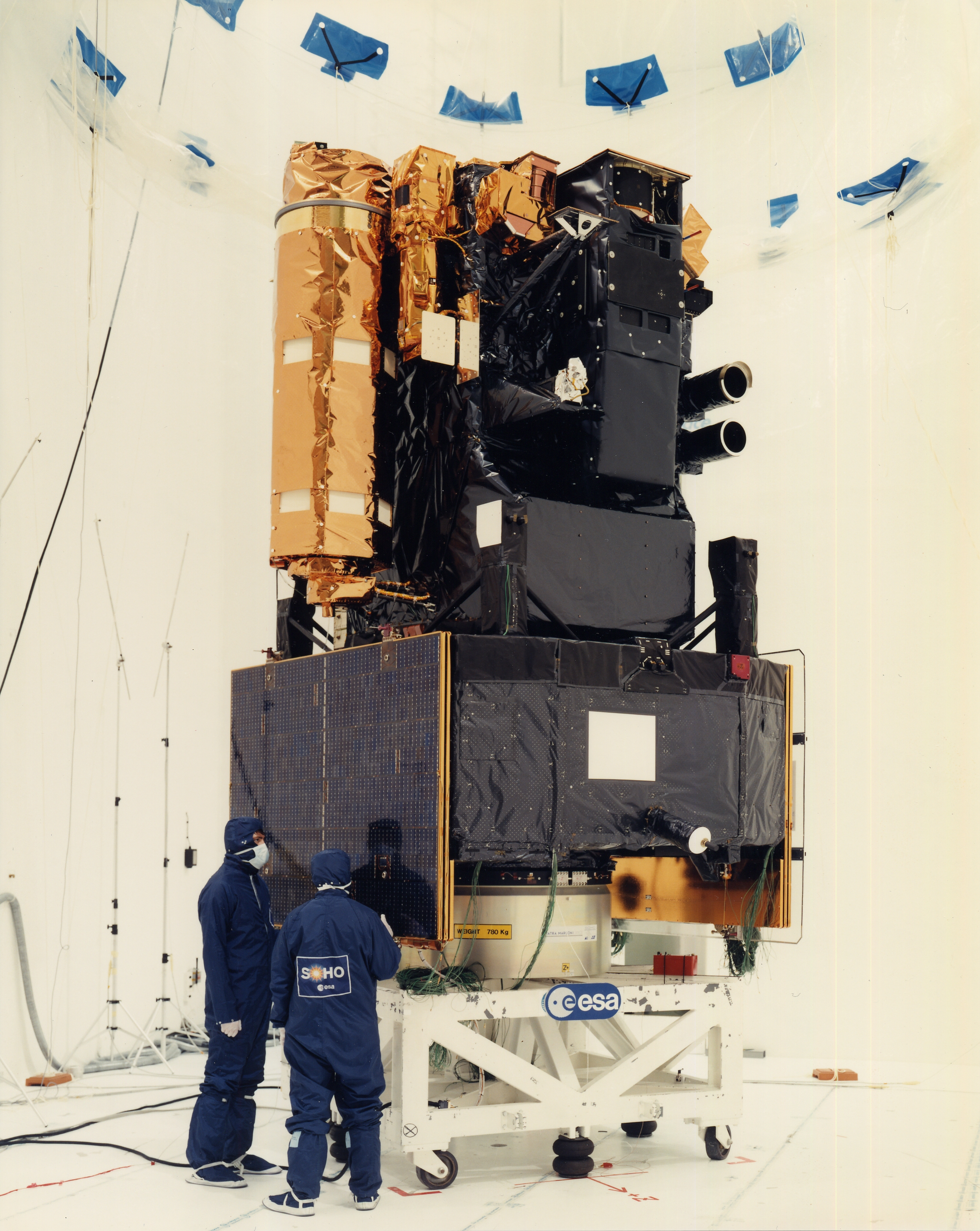 Foto met 2 personen ter illustratie van de grootte van SOHO.